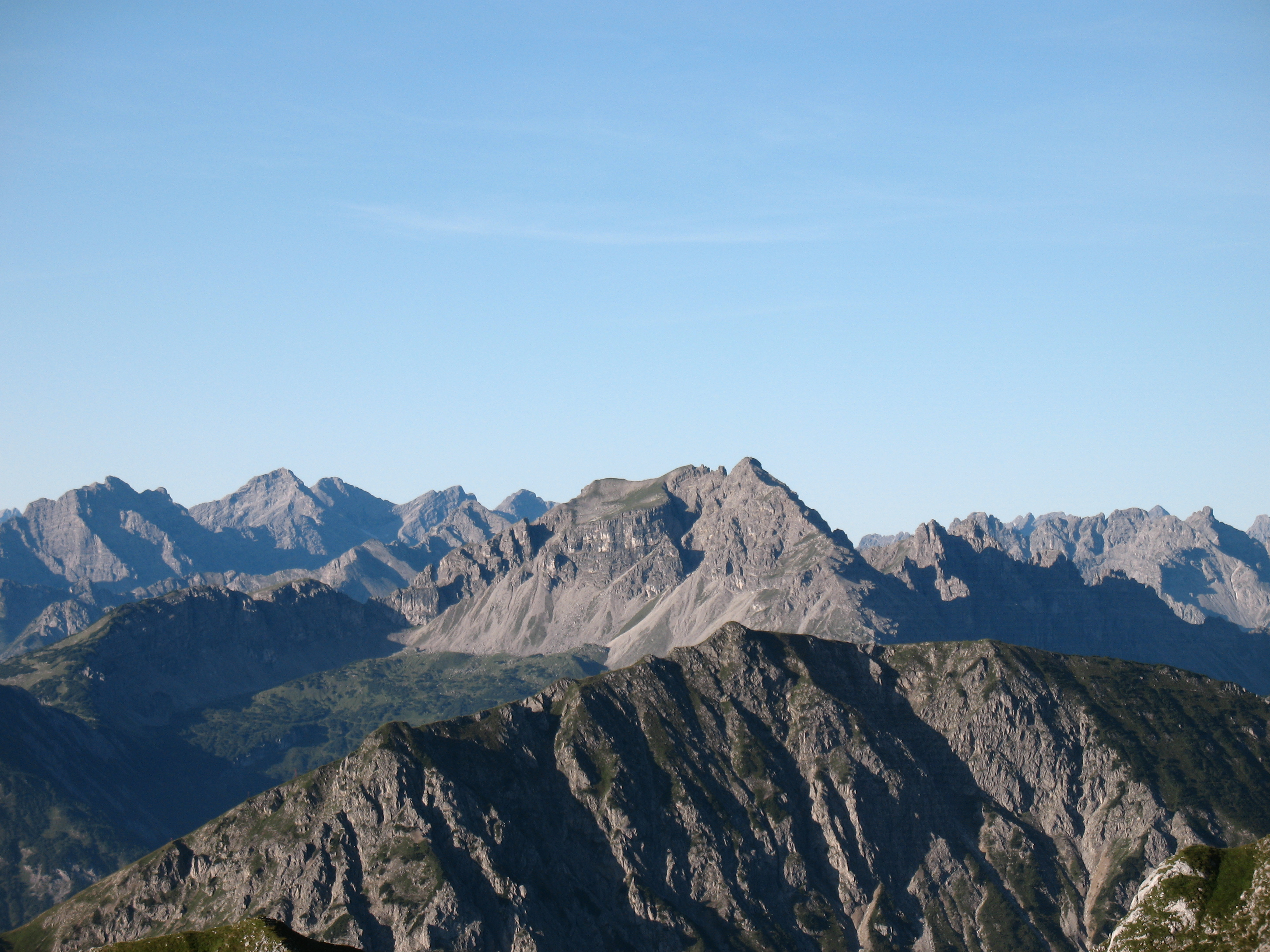 Im Vordergrund: Krinnenspitze (2000 m), dahinter: Leilachspitze (2274 m)